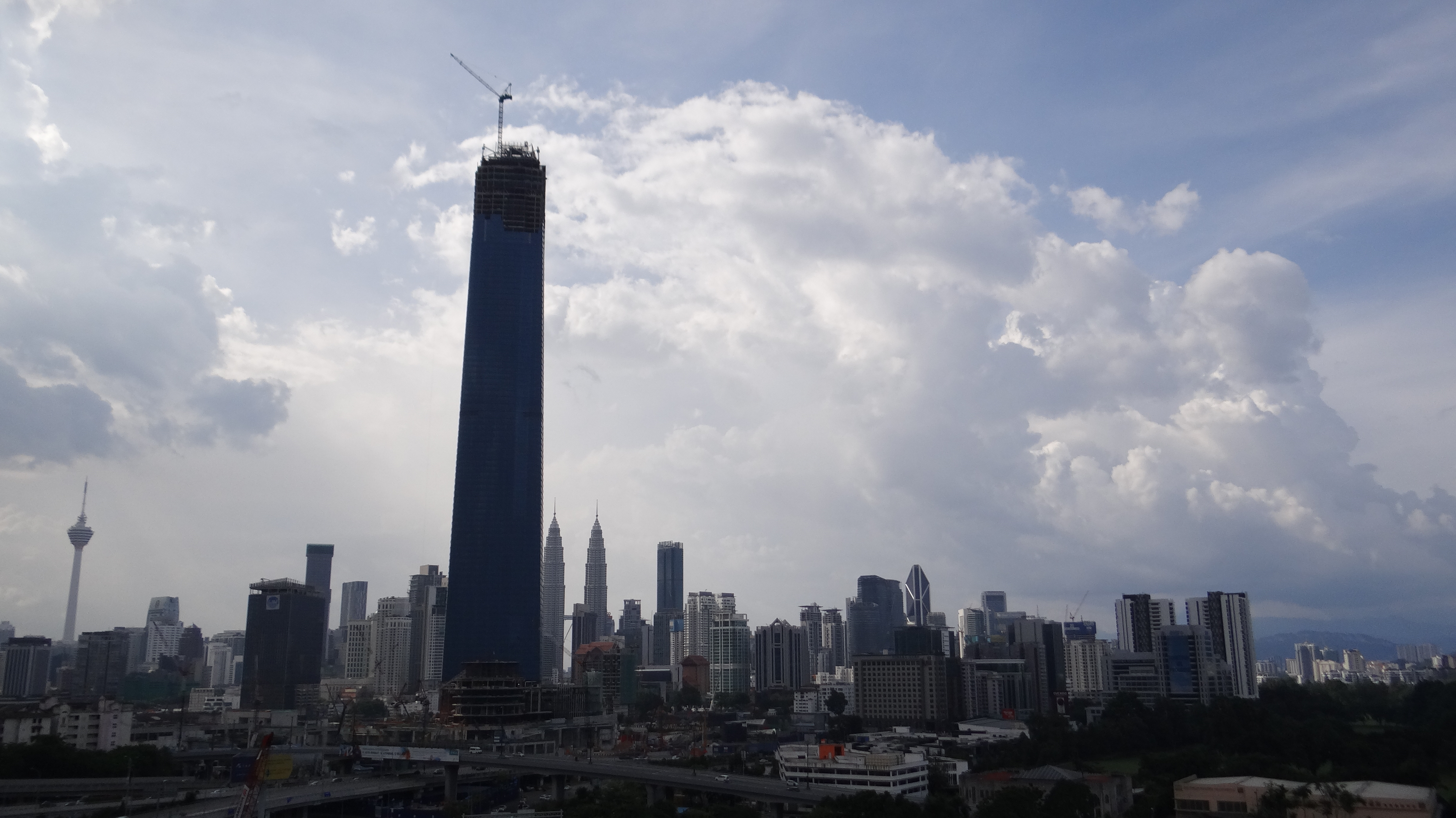 The Exchange 106 MyTown Roof